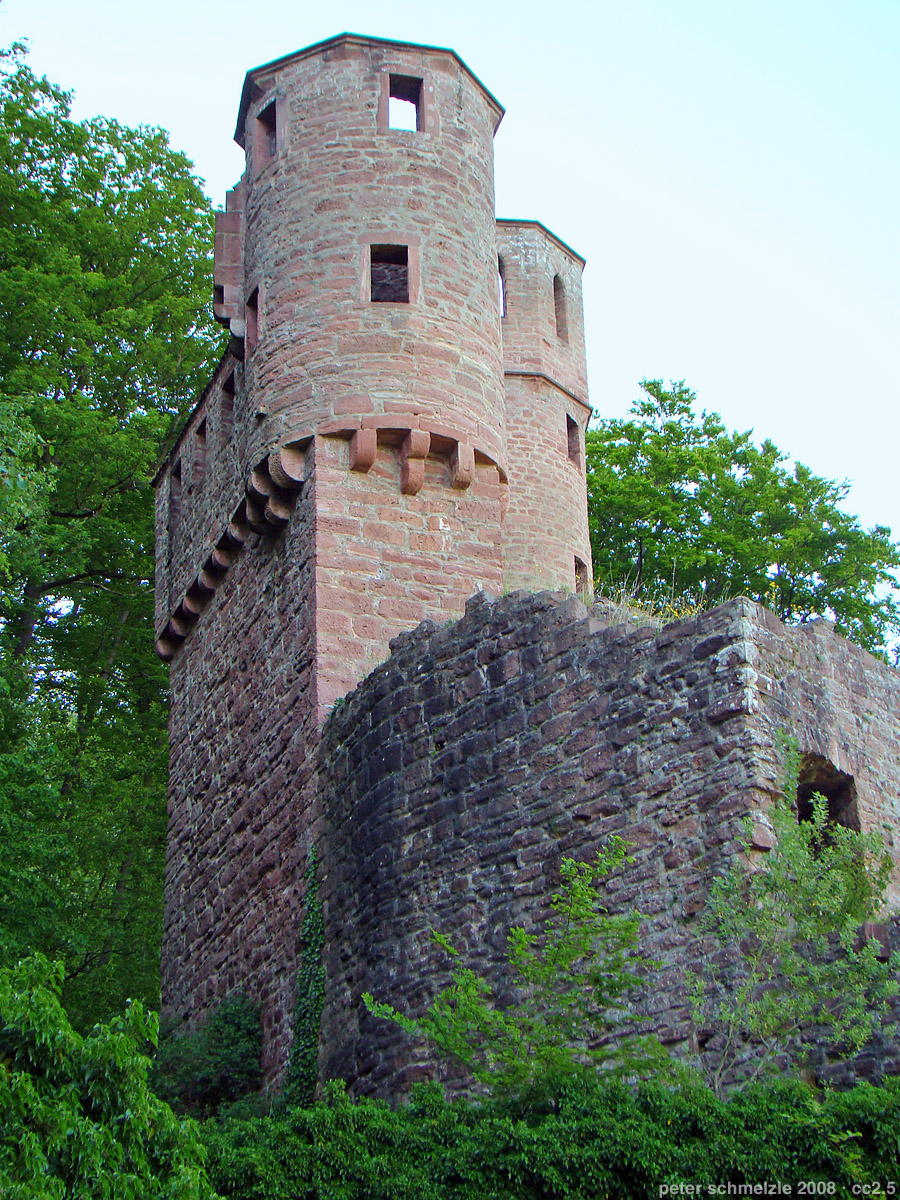 Wehrgang auf der Schildmauer der Burg Schadeck (Schwalbennest) bei Neckarsteinach